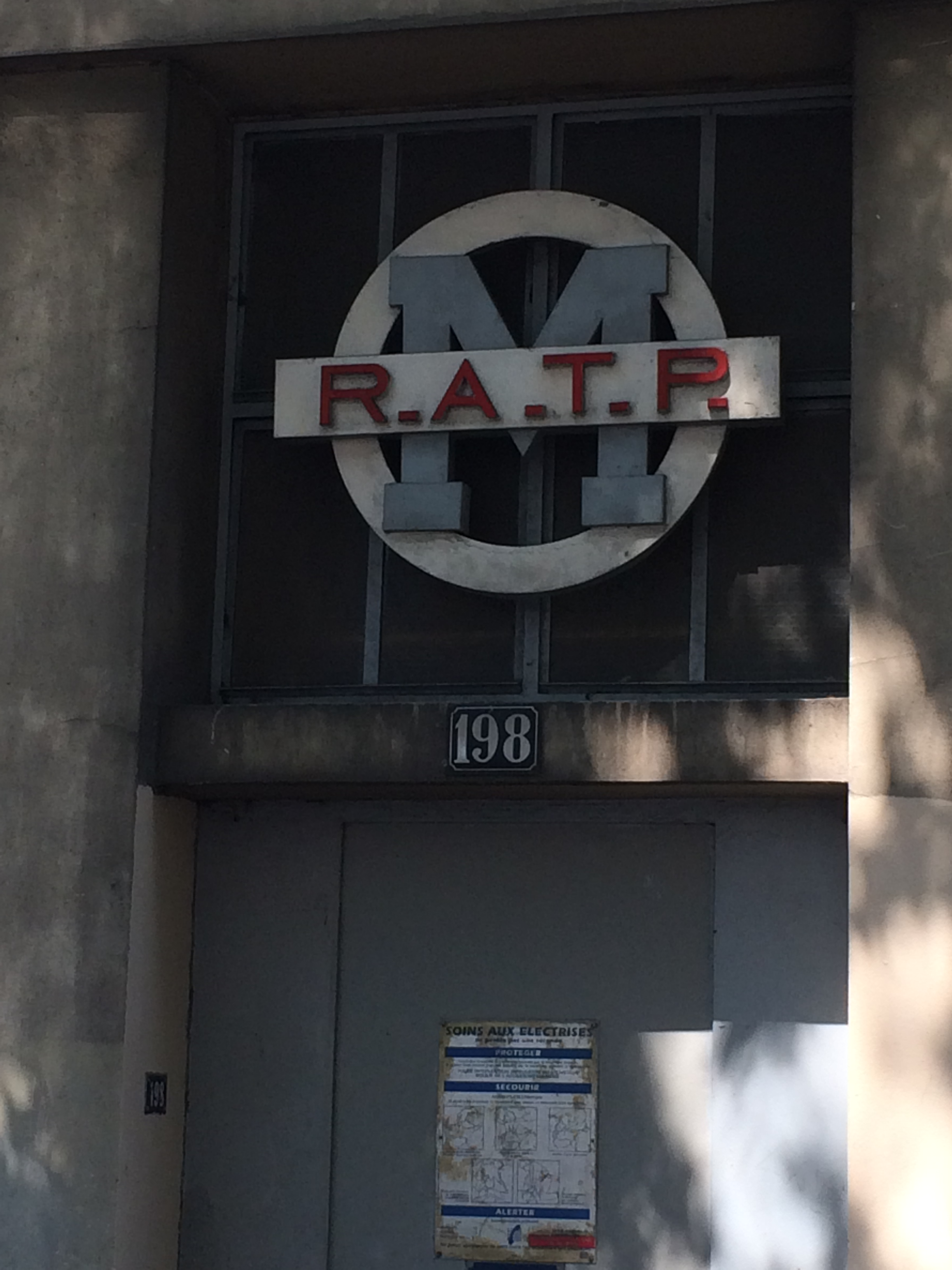 Aux abords de la station,de métro Carrefour Pleyel (au 198 boulevard Anatole France), un poste de redressement électrique de la RATP arbore un ancien logo.